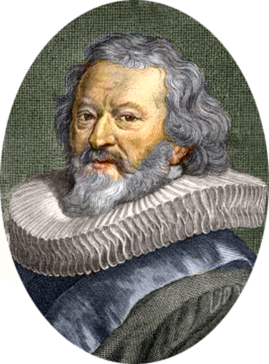 Gerardus Vossius, ingekleurde oude prent. PD wegens ouderdom